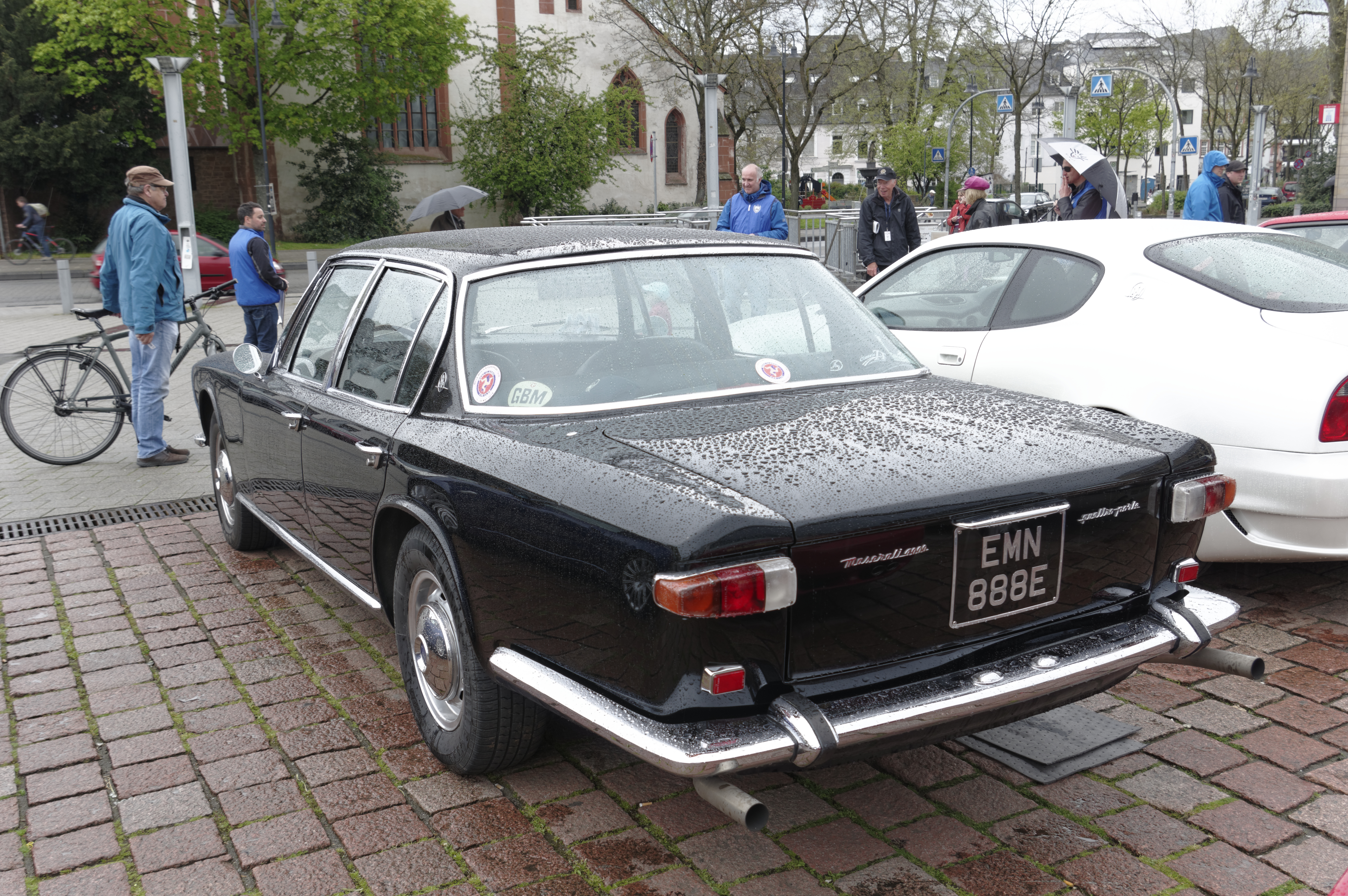 Ausstellung eines britischen Maserati Clubs in Trier